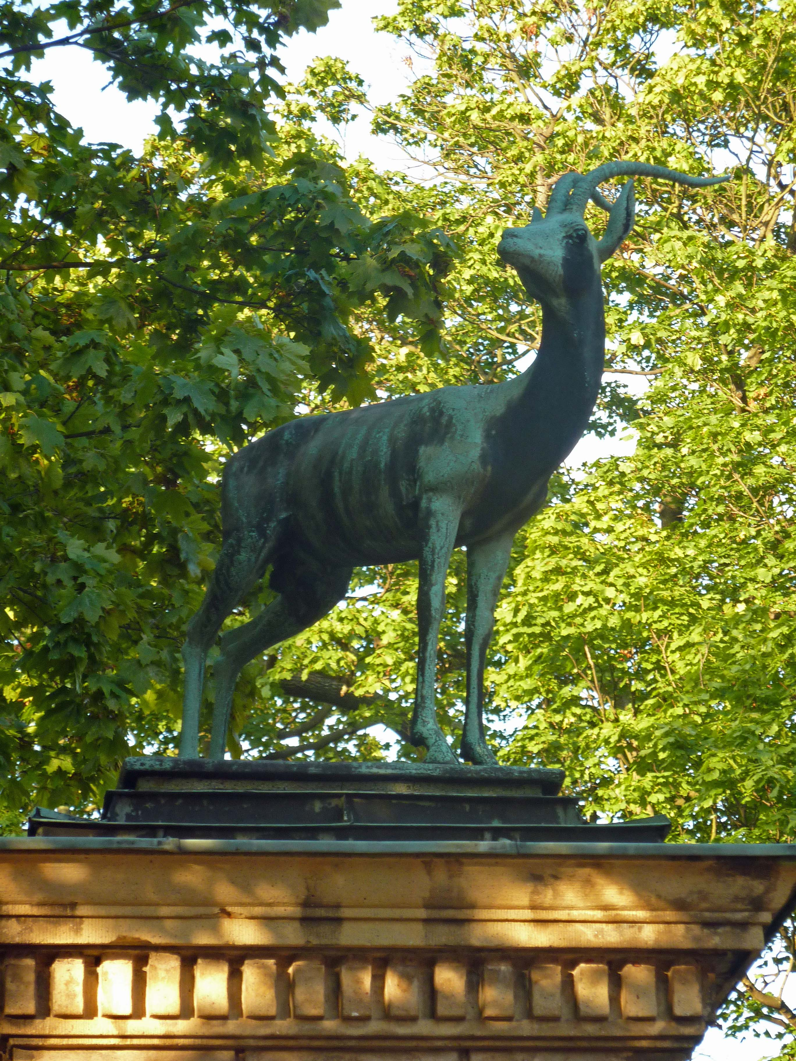 Eine der zwei bronzenen, etwas überlebensgroßen Gazellen von Walter Sutkowski aus dem Jahr 1956 auf dem alten Haupteingang des Tierparks Berlin vor dem Schloss Friedrichsfelde: die Plastik auf dem nördlichen Portalpfeiler